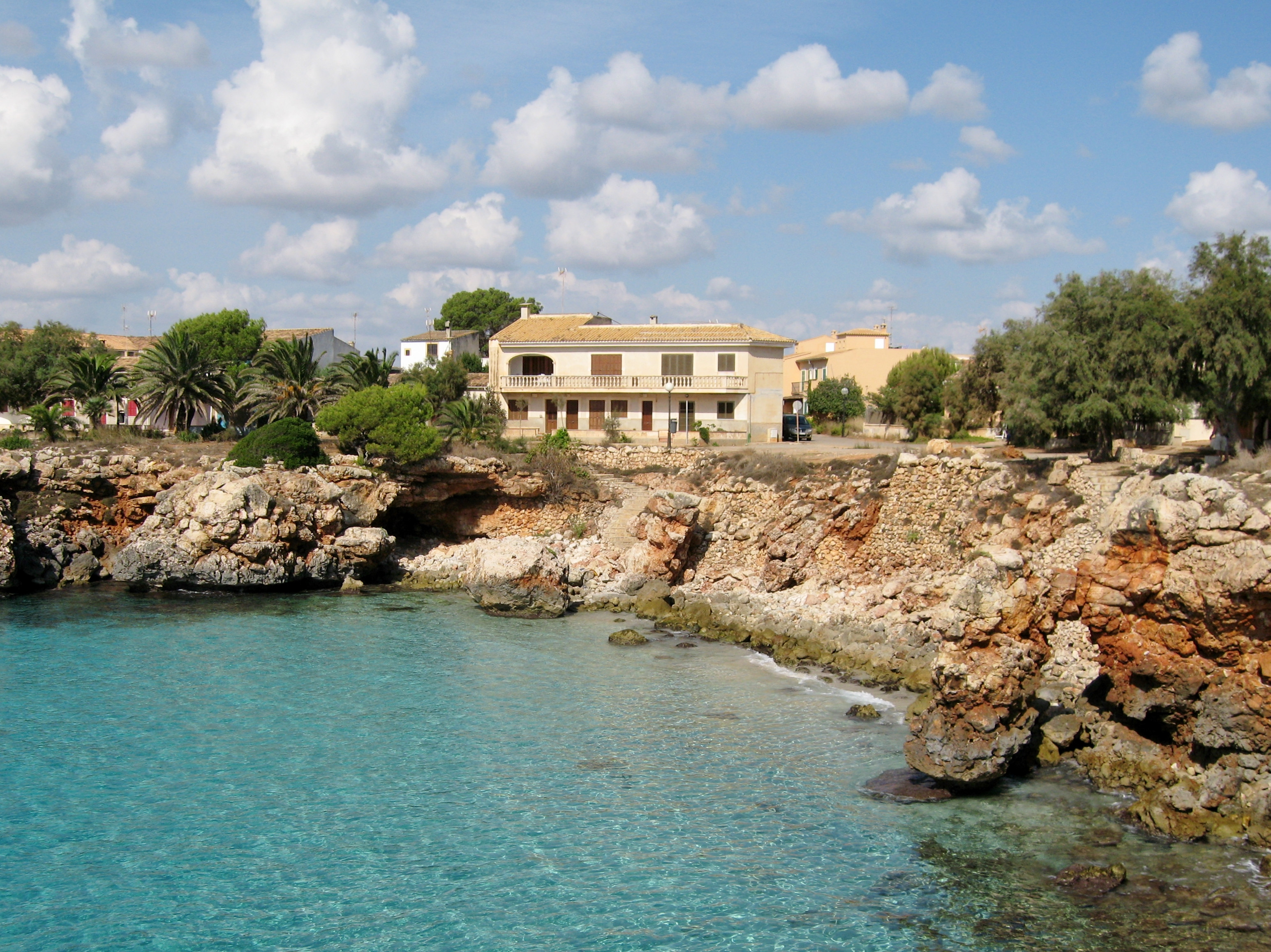 Cala Morlanda, Gemeinde Manacor, Mallorca, Spanien